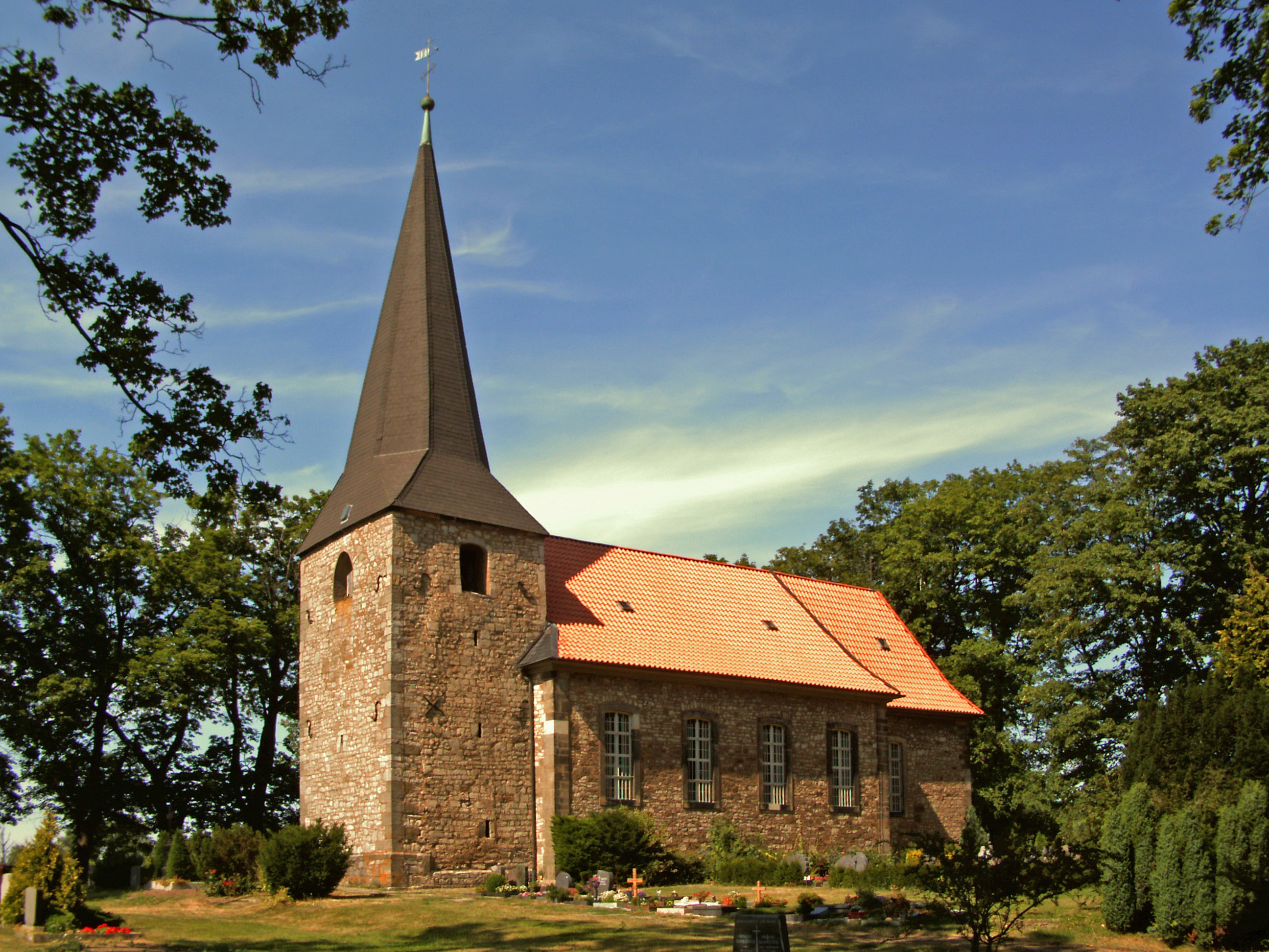 Katholische Kirche St. Peter und Paul in Ahrbergen, Ortsteil von Giesen